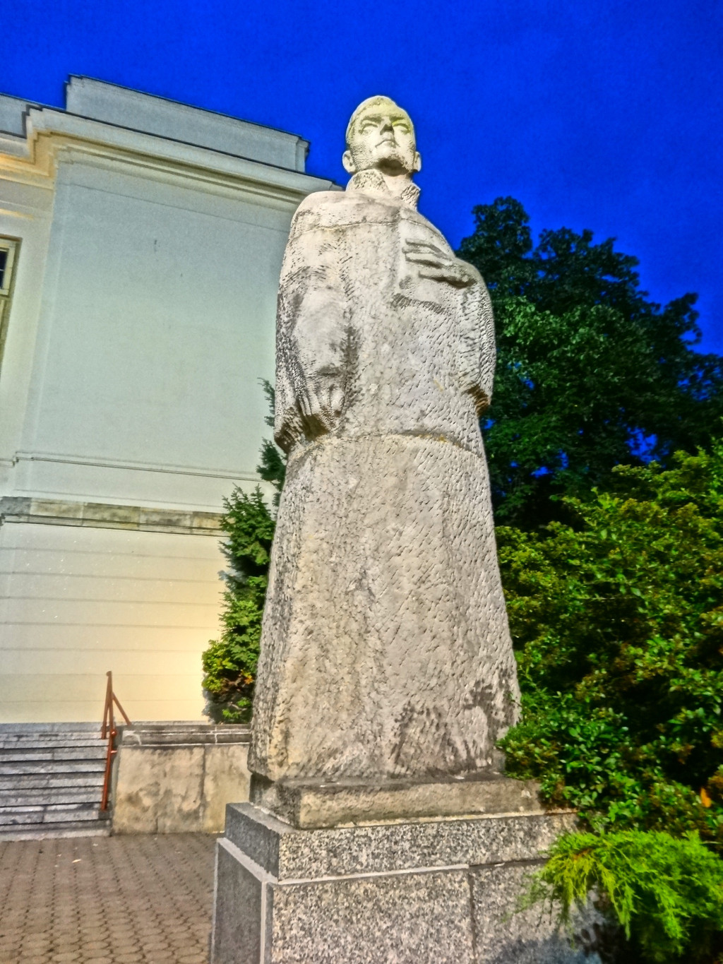 Posąg Karola Szymanowskiego w otoczeniu Filharmonii Pomorskiej w Bydgoszczy